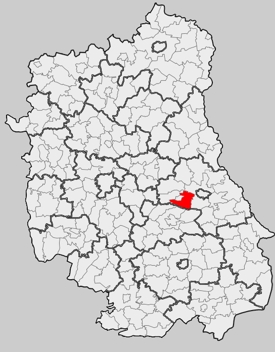 Map of gmina Rejowiec, Chełm county, Lublin voivodship Mapa gminy Rejowiec, powiat chełmski, województwo lubelskie